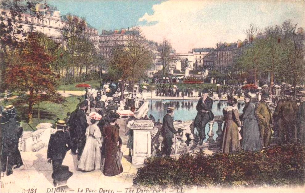 Carte postale ancienne DIJON -Jardin Darcy